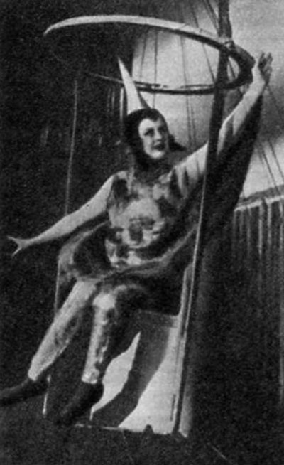 Таиса Савва - мастер художественного свиста